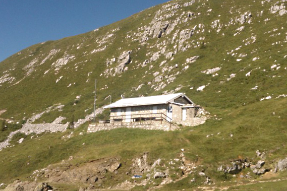 Rifugio Mistri - Val del Riso, Gorno (BG)